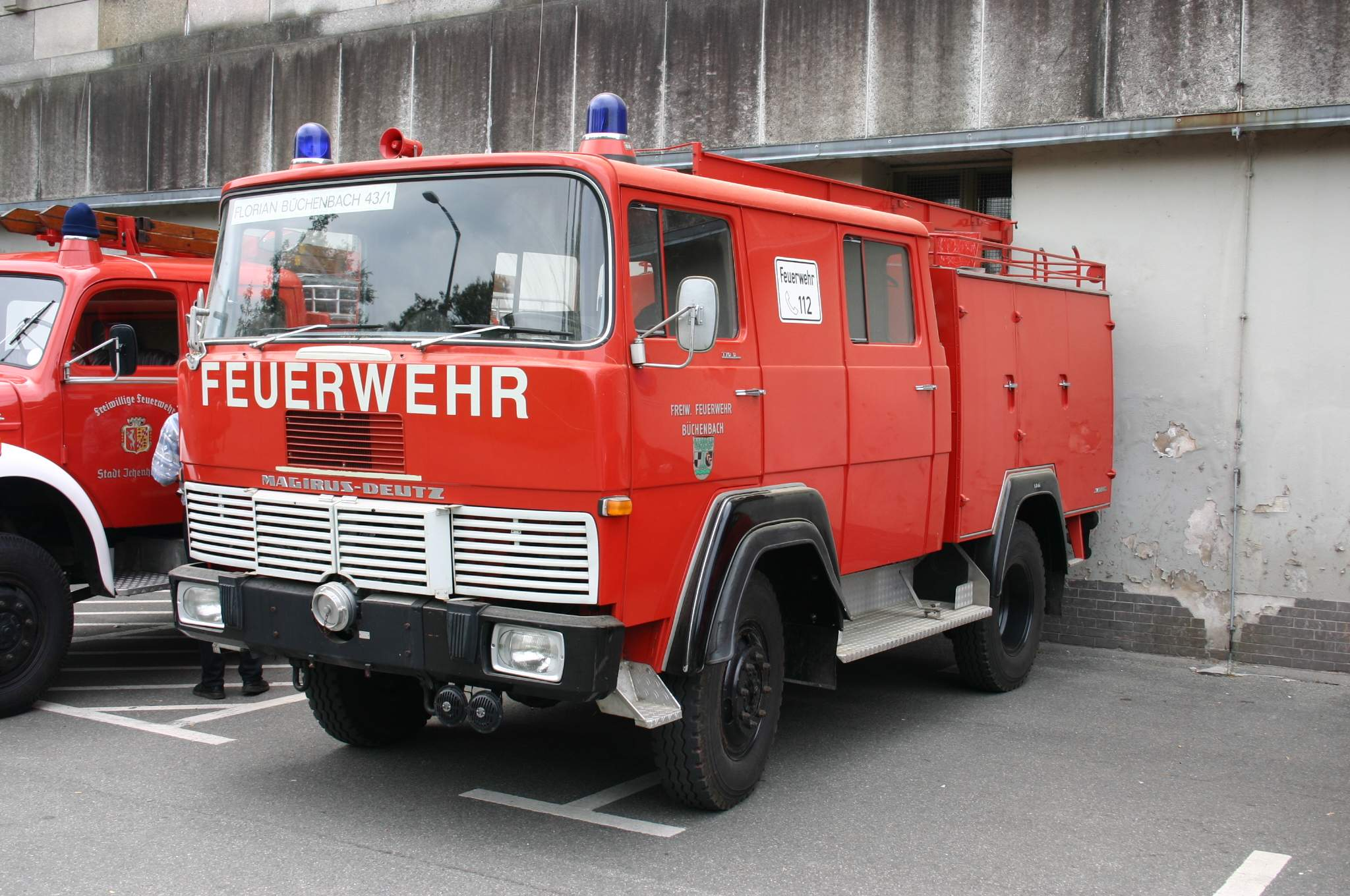 Löschgruppenfahrzeug LF 8 - TS (ehemals FFW Büchenbach)